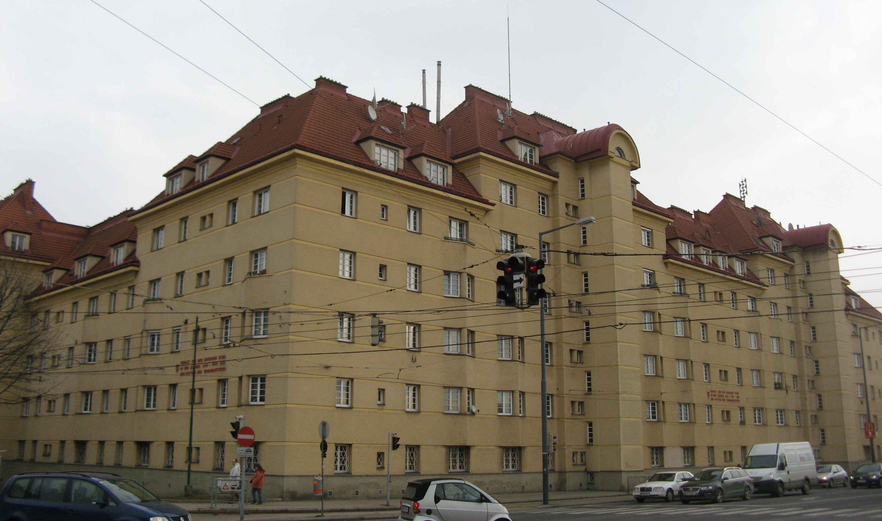 Jean-Jaurès-Hof (1925-27) von Alfred Keller und Walter Brossmann, Neilreichgasse 105, Wien-Favoriten